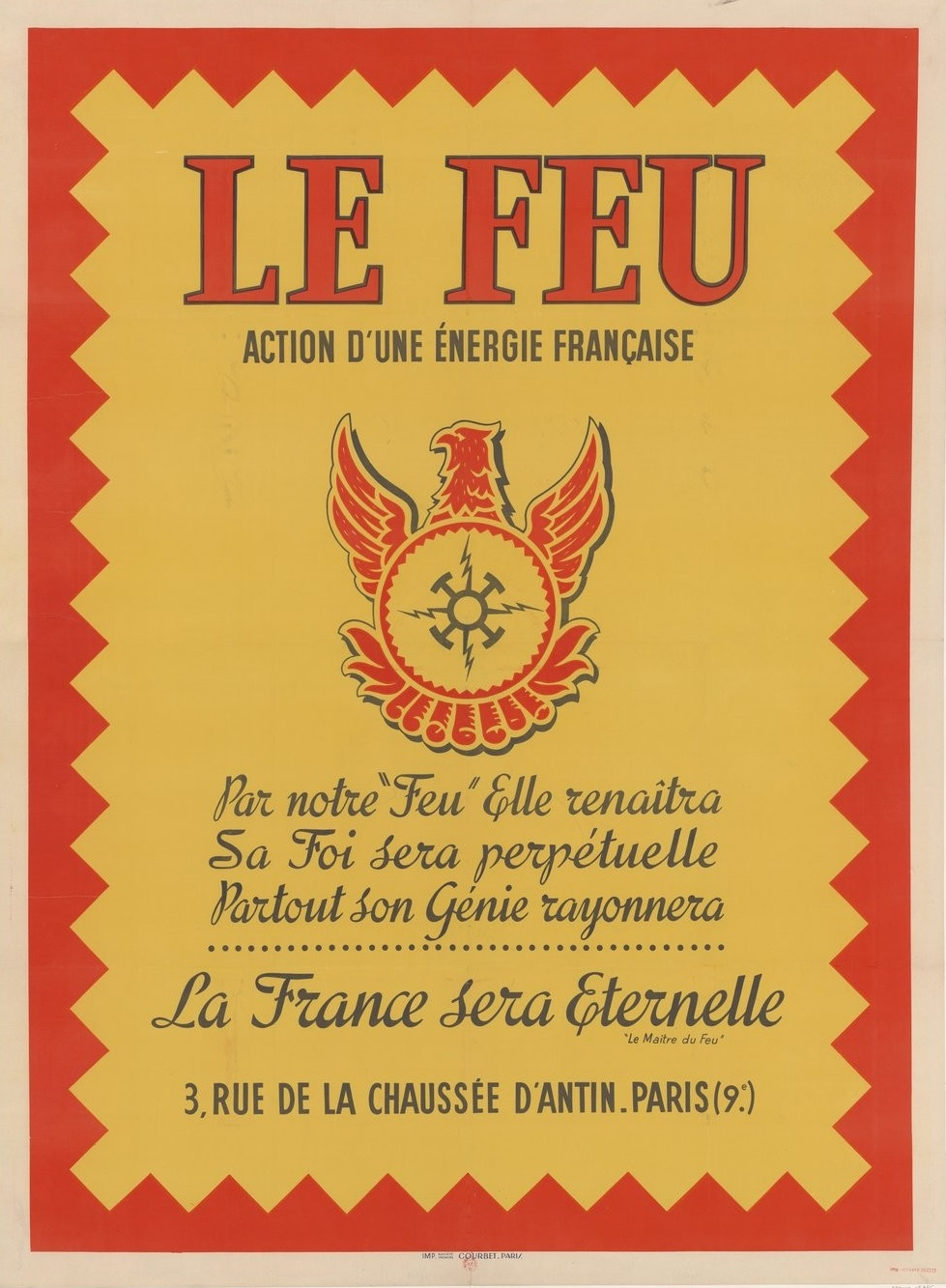 Affiche vantant les mérites du Feu, groupuscule collaborationniste de Maurice Delaunay : « Le Feu, action d'une énergie française. Par notre "feu" elle renaîtra. Sa foi sera perpétuelle... La France sera éternelle », 1941.